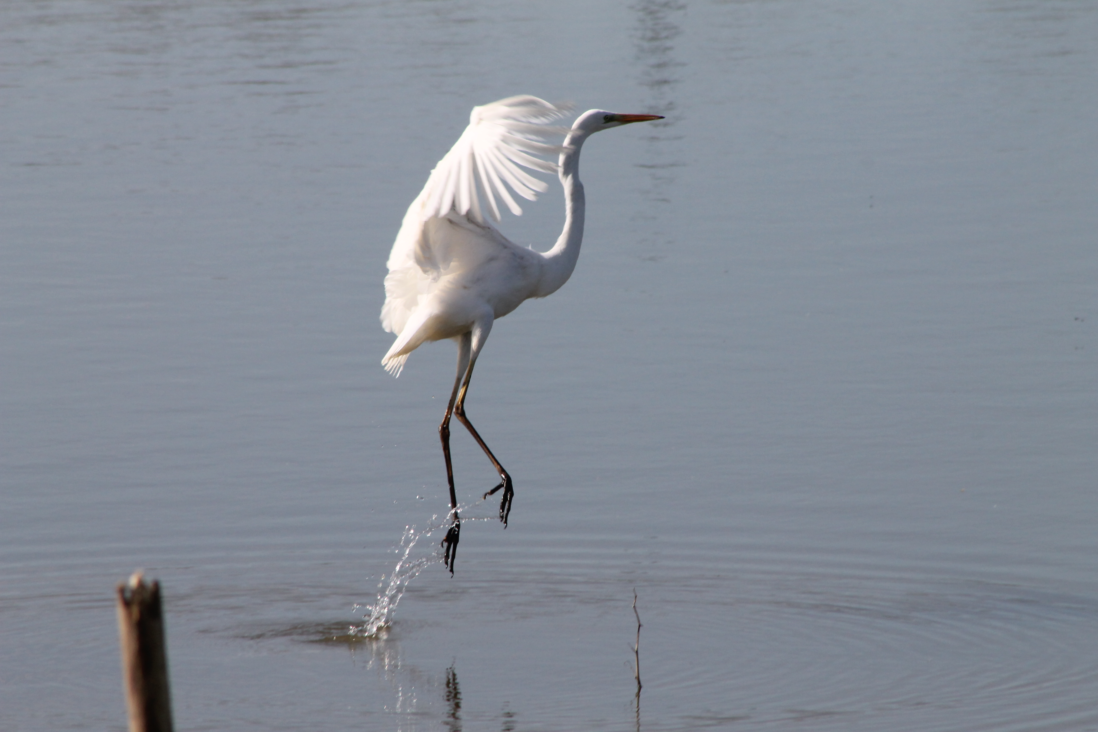 Agró blanc aixecant el vol a Sils